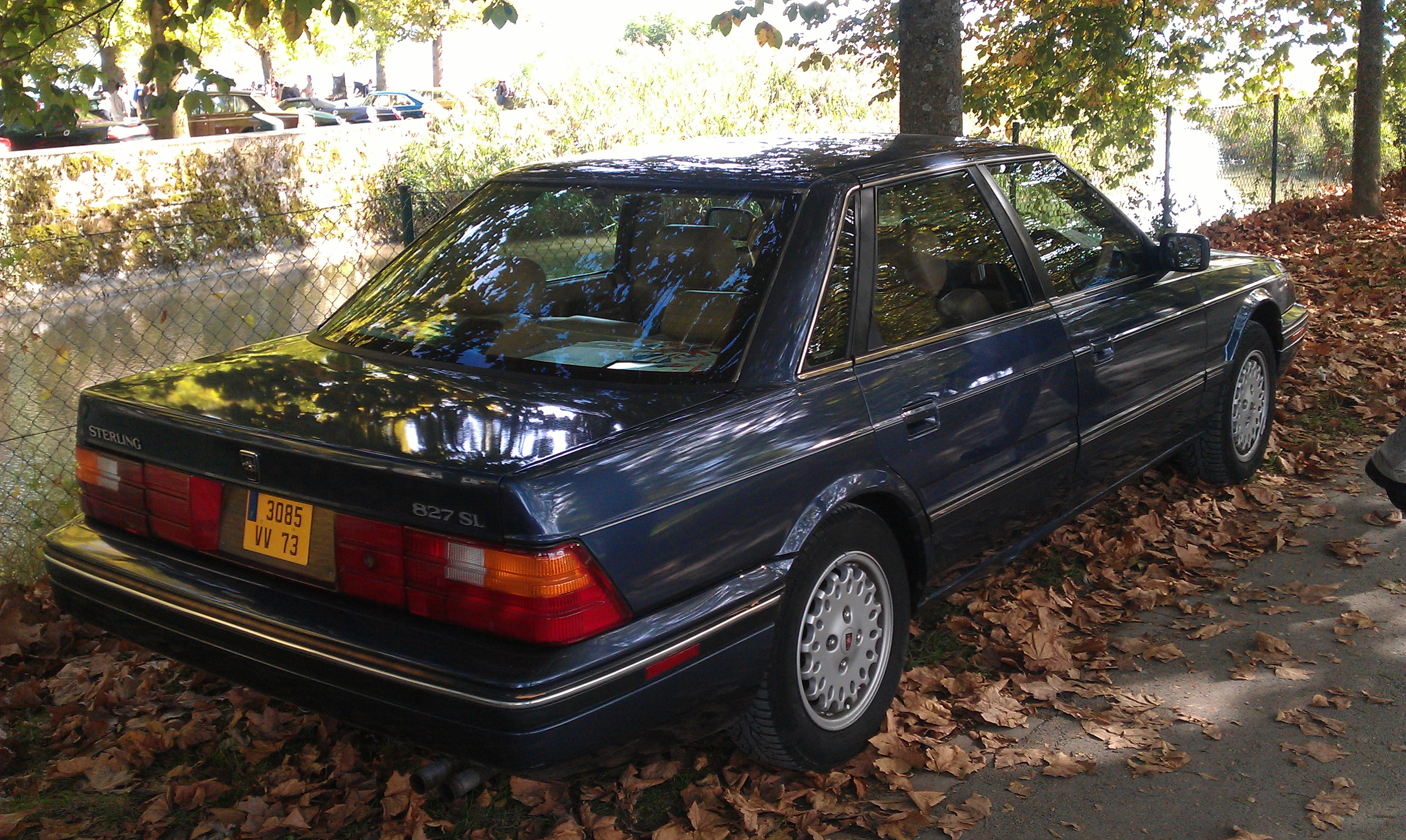 1990 Sterling 827 SL 2.7L V6